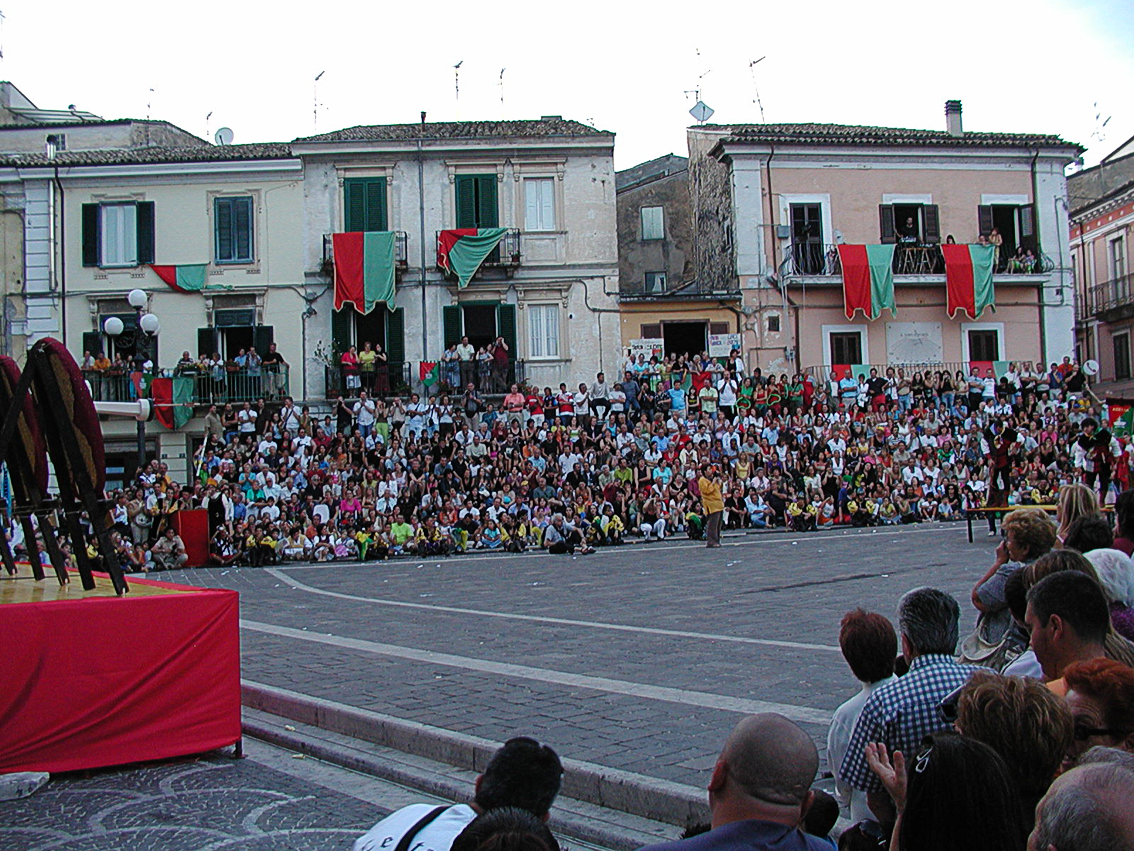 Das Armbrustschießen wären des Mittelalterfestes